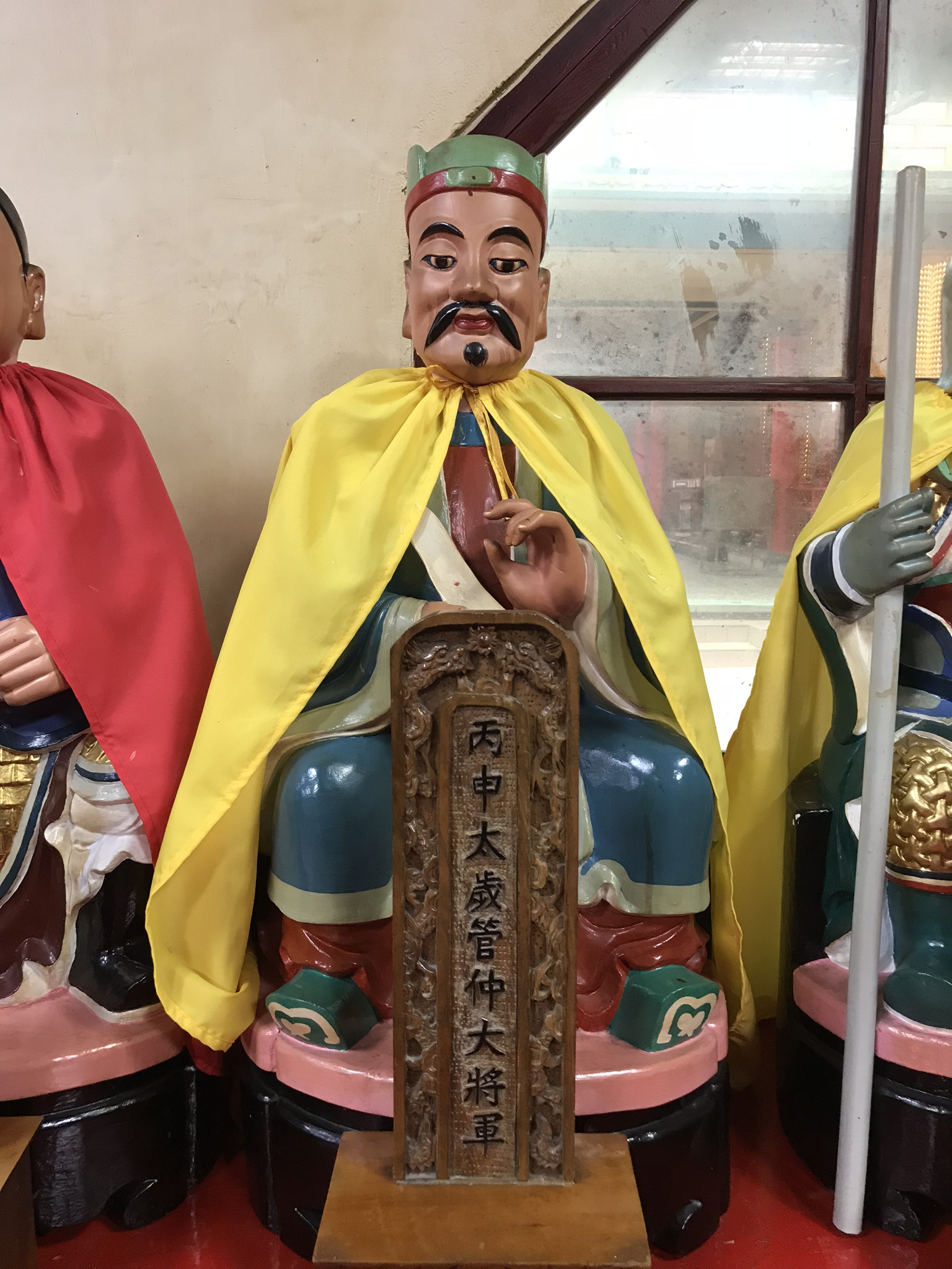 丙申太歲管仲大將軍神像